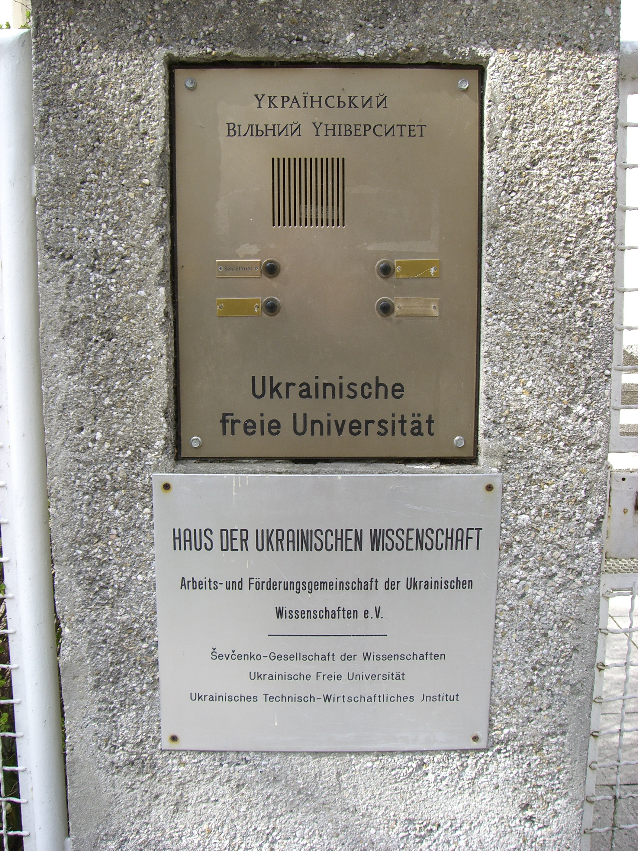 München: Ukrainische Freie Universität (Schild)